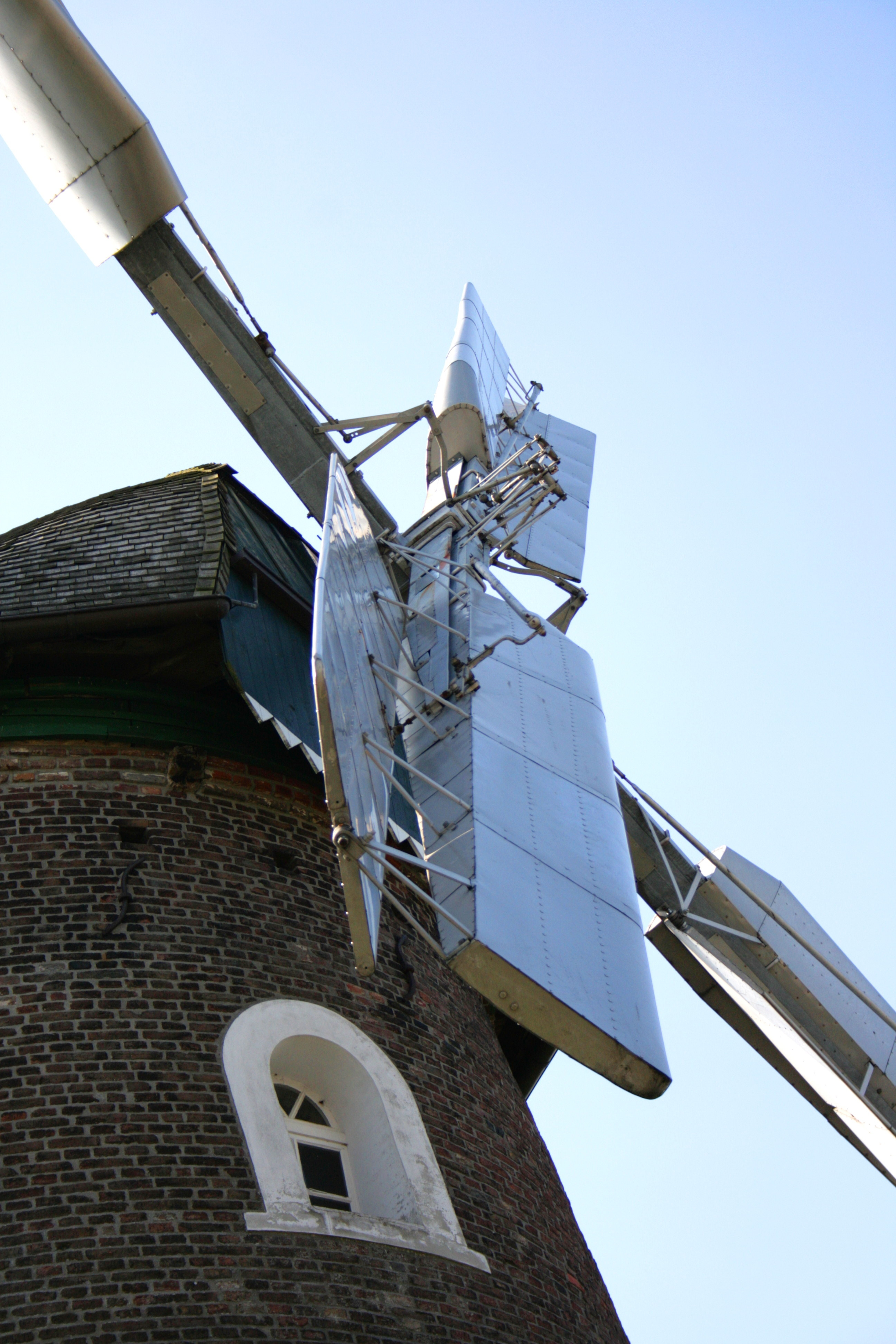 Scholten-Mühle, Zur Windmühle 6 in Rees